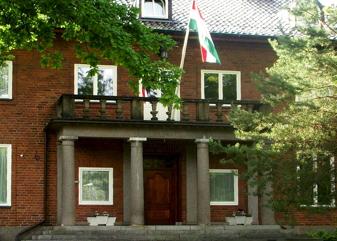 Exempel på en altan till en villa i Diplomatstaden i Stockholm.